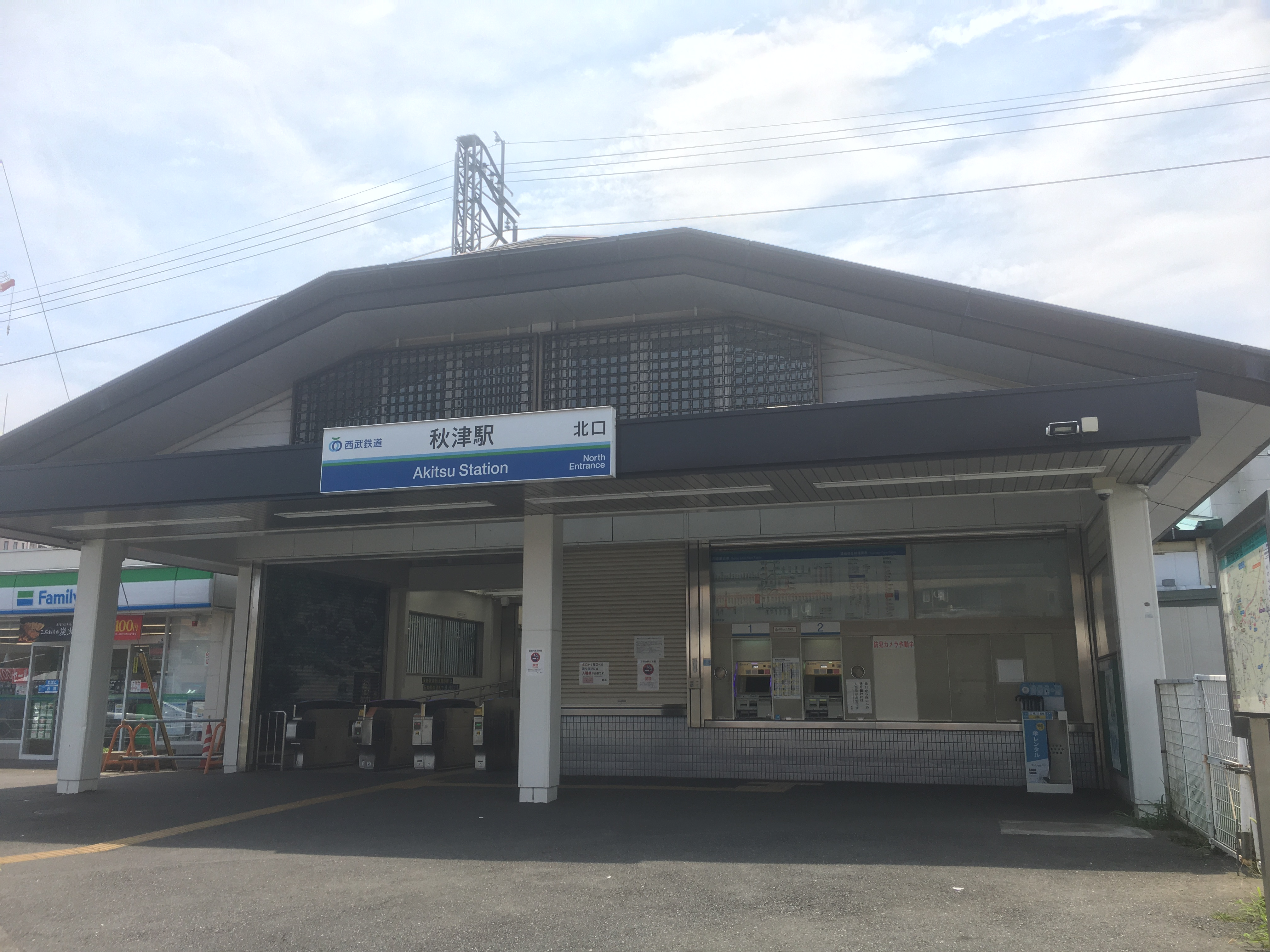 秋津駅 (Akitsu Station)